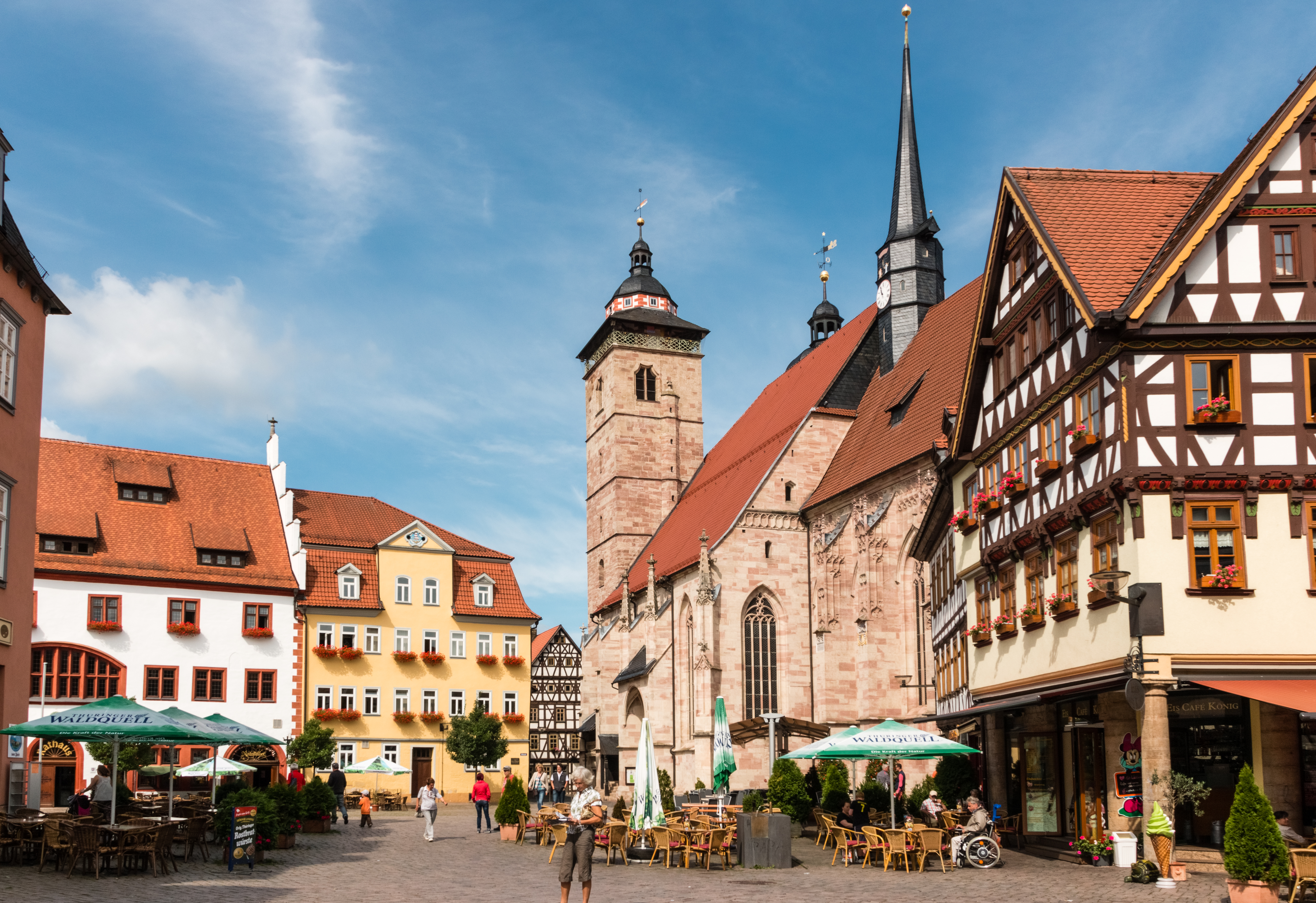 Altstadt von Schmalkalden mit Rathaus und Stadtkirche St. Georg am Altmarkt